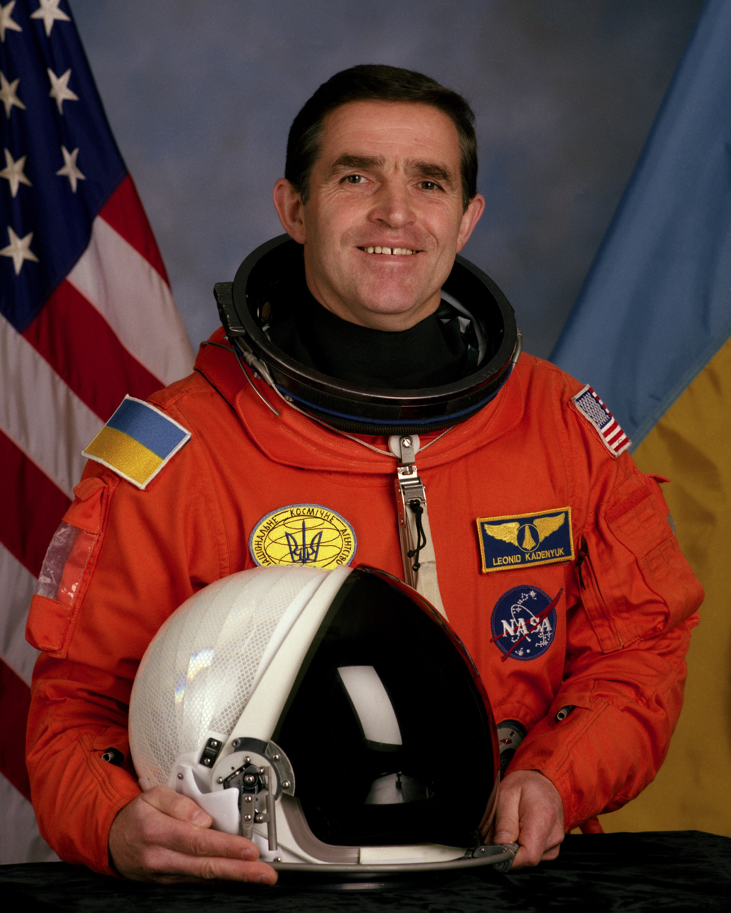 Portrait cosmonaut Leonid Kadenyuk